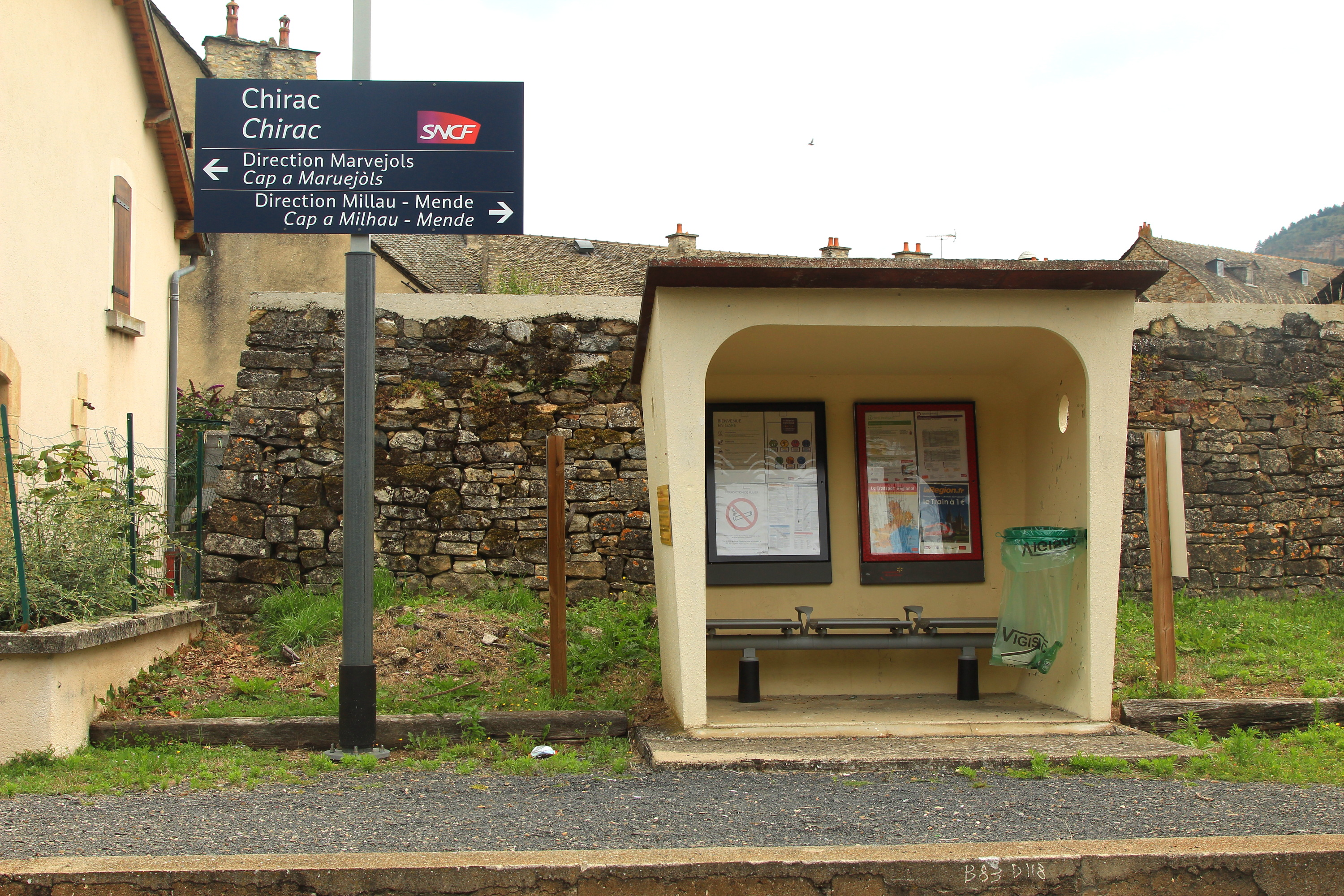 L'aubette faisant office d'abri de quai de la gare de Chirac.